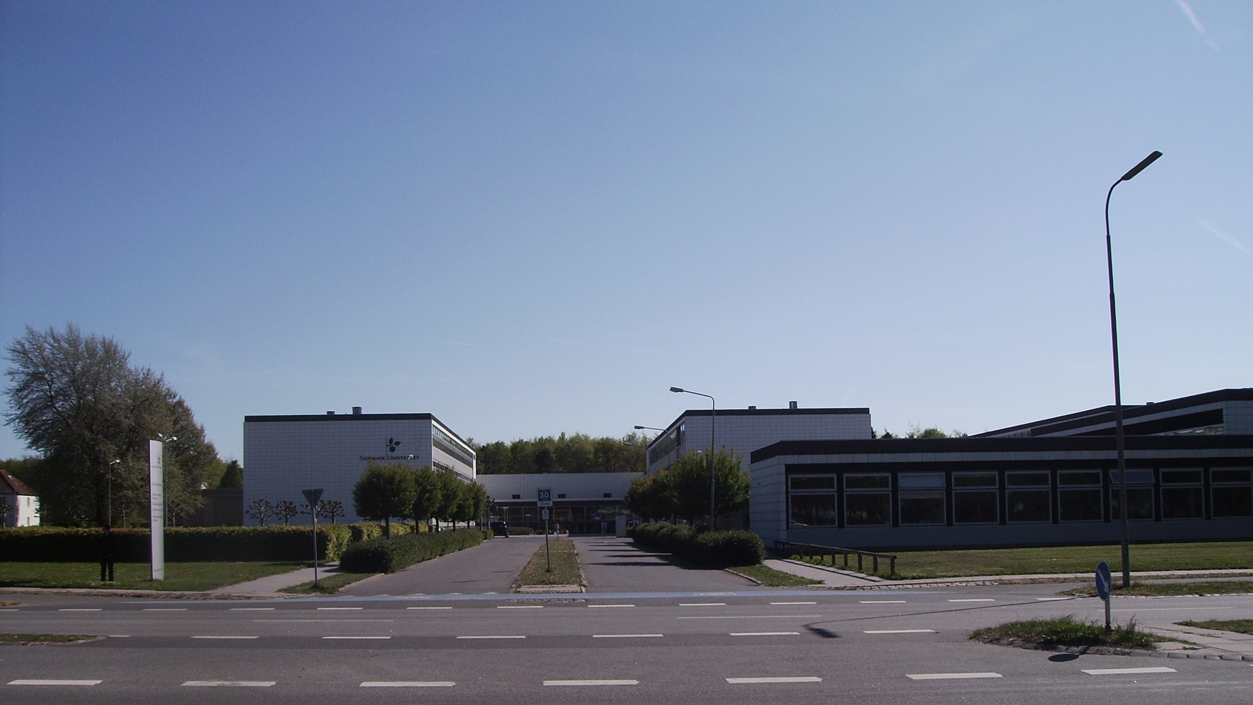 Odense Teknikum fra nord, Odense, Munkebjerg Sogn, Odense Herred, Odense Amt, Denmark (Danish University)